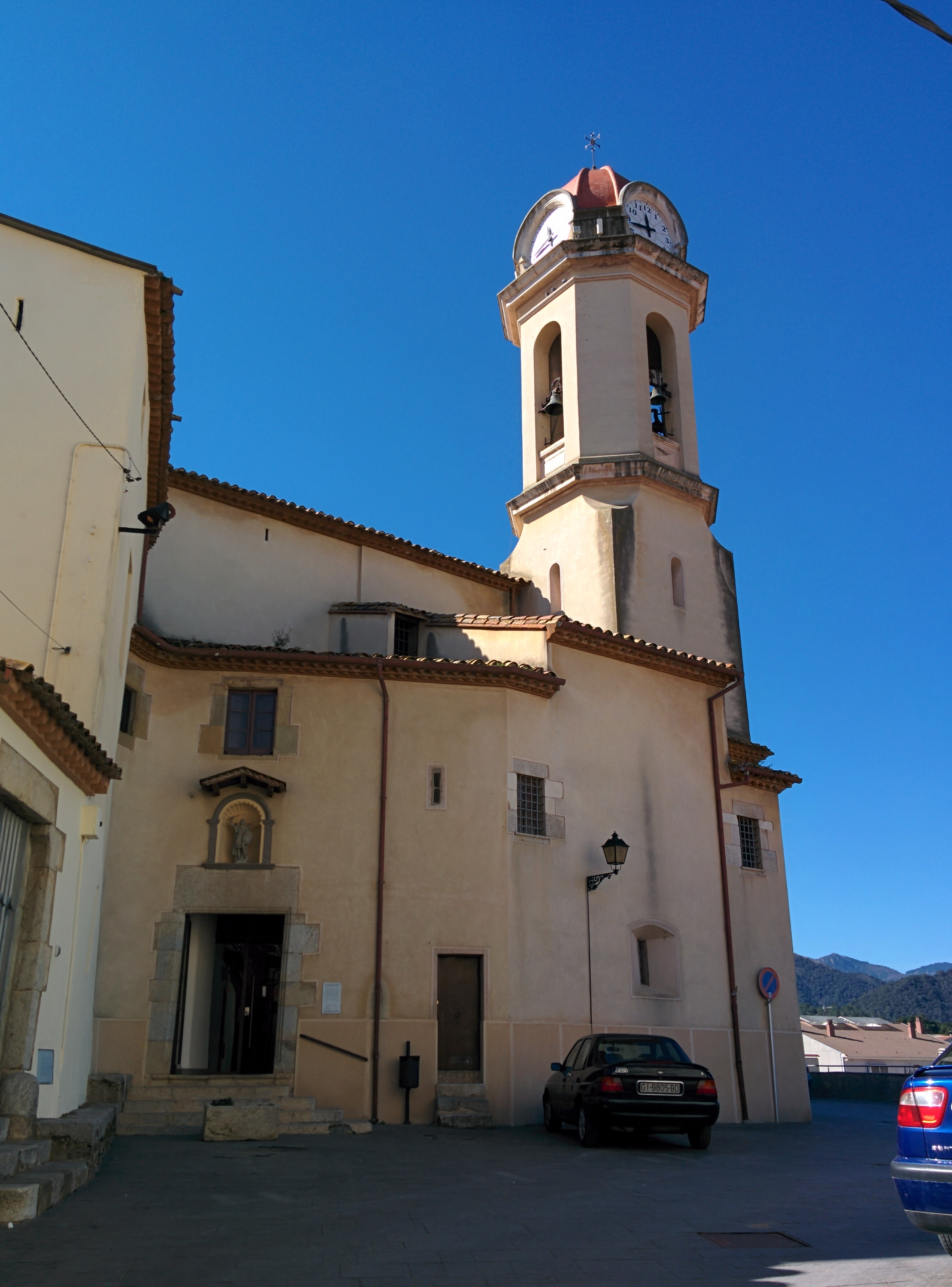 Església parroquial de Sant Miquel (Anglès)